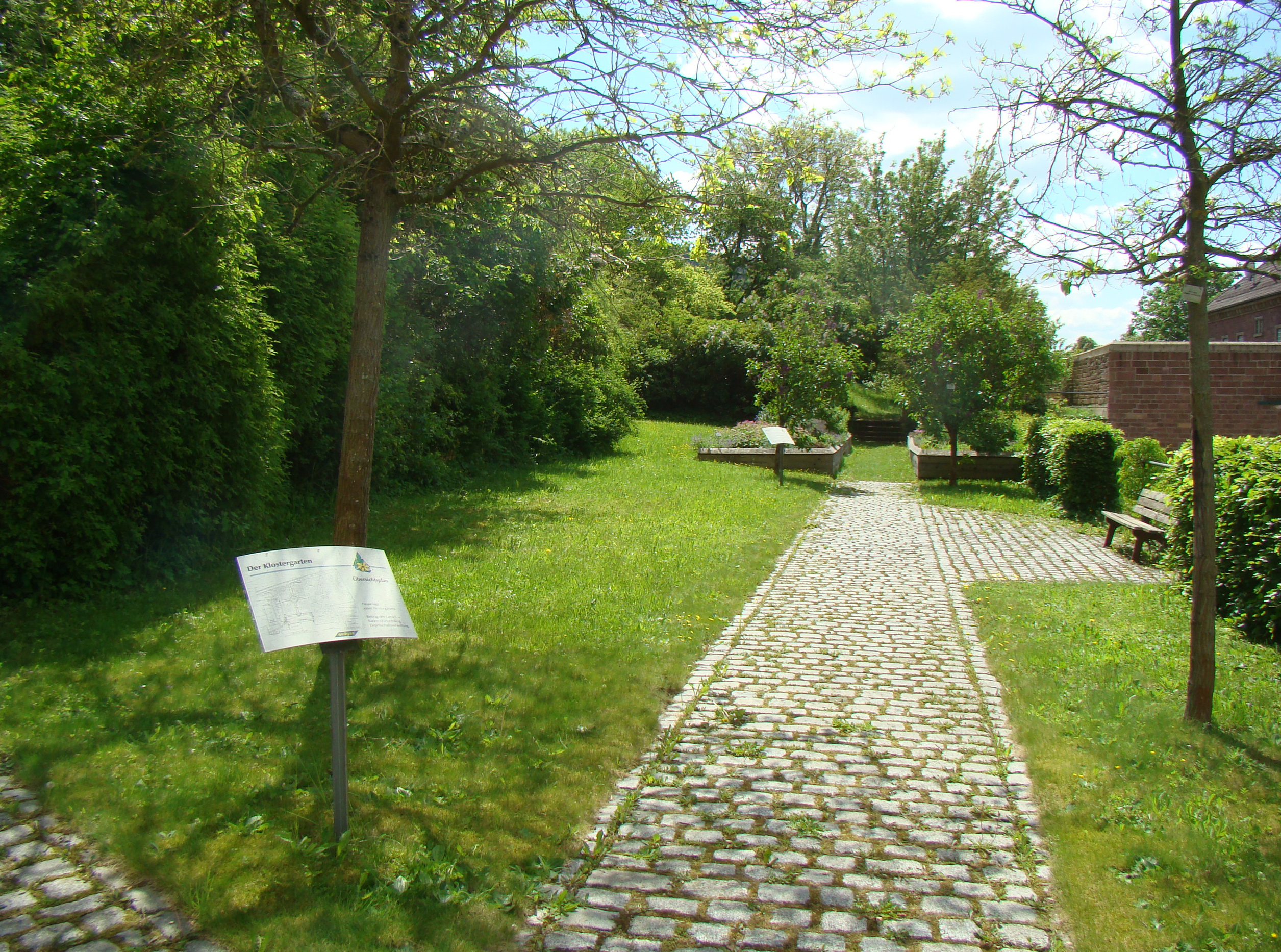 Franziskanerkloster Mosbach: neu angelegter Klostergarten